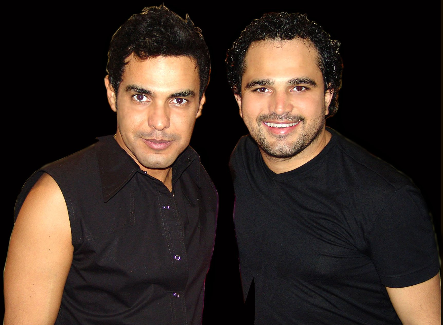 Brazilian duo Zezé Di Camargo & Luciano.